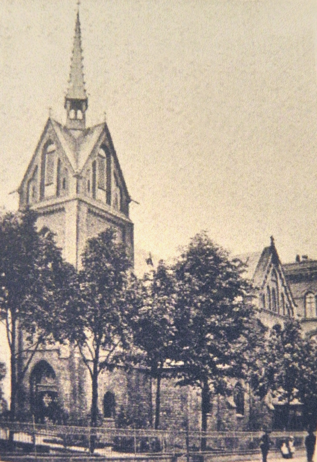 Kirche St. Peter und Paul, Eberswalde. Historische Außenansicht. Foto um 1910